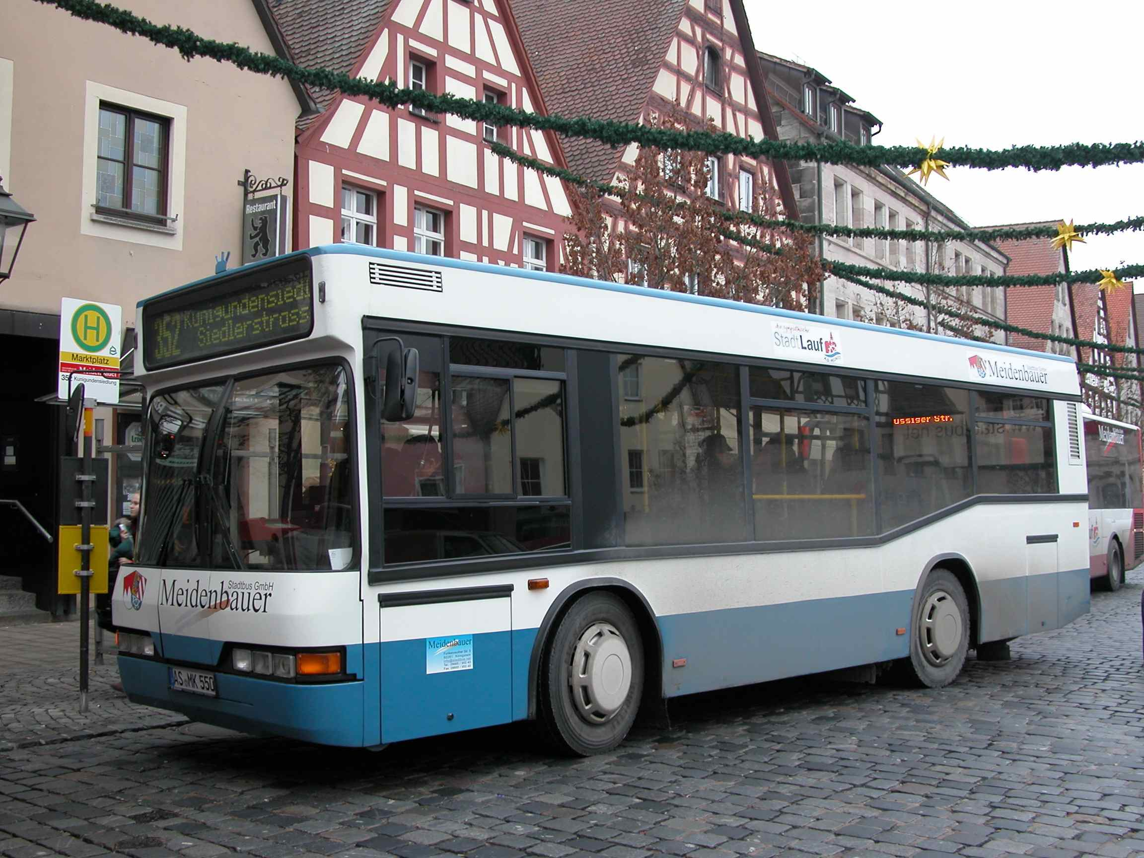 Meidenbauer_MK 550 in Lauf